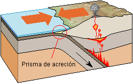 Autor: Usuario:Luis María Benítez